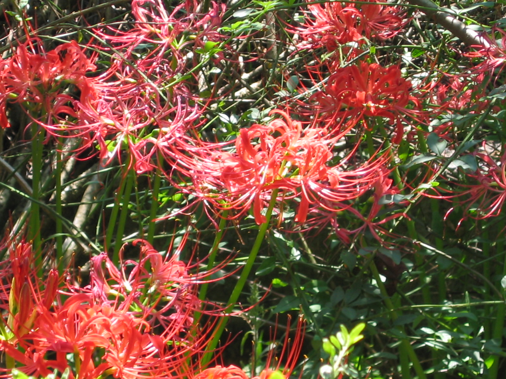 中文（中国大陆）: 石蒜花丛。2005年9月19日摄于浙江诸暨五泄。